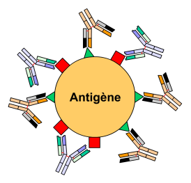 Schéma d'anticorps polyclonaux Auteur : Yohan Source : Crée avec Flash5 Licence : GFLD Yohan